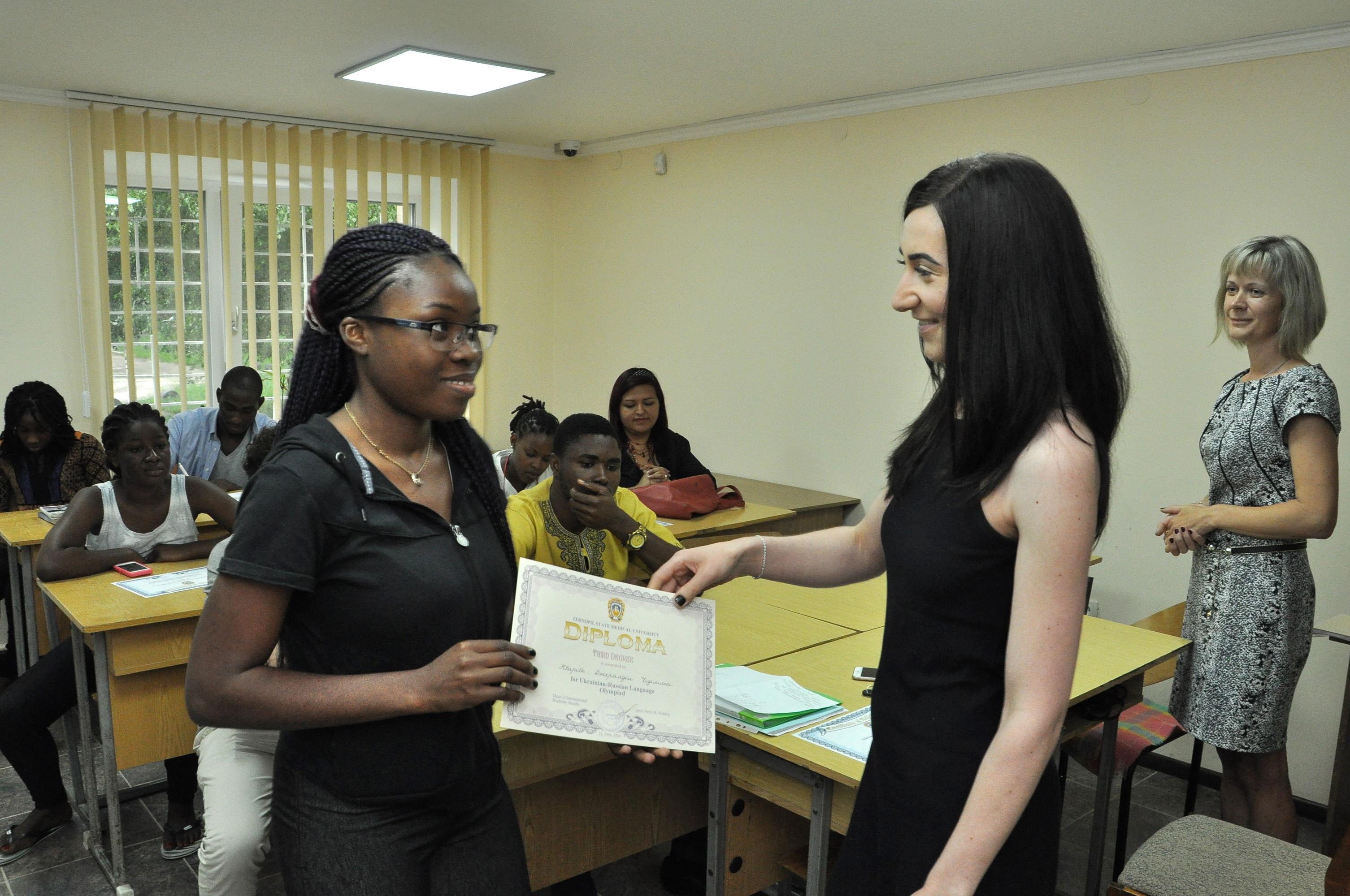 Вручення дипломів слухачам підготовчого відділення для іноземців та осіб без громадянства Тернопільського державного медичного університету імені І. Я. Горбачевського. Диплом Нварібе Джералдін Чідімма вручає Марина Тимощук.